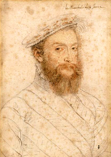 Kreidezeichnung aus der Werkstatt von François Clouet: Der Marschall von Frankreich Piero Strozzi (1510-1558)